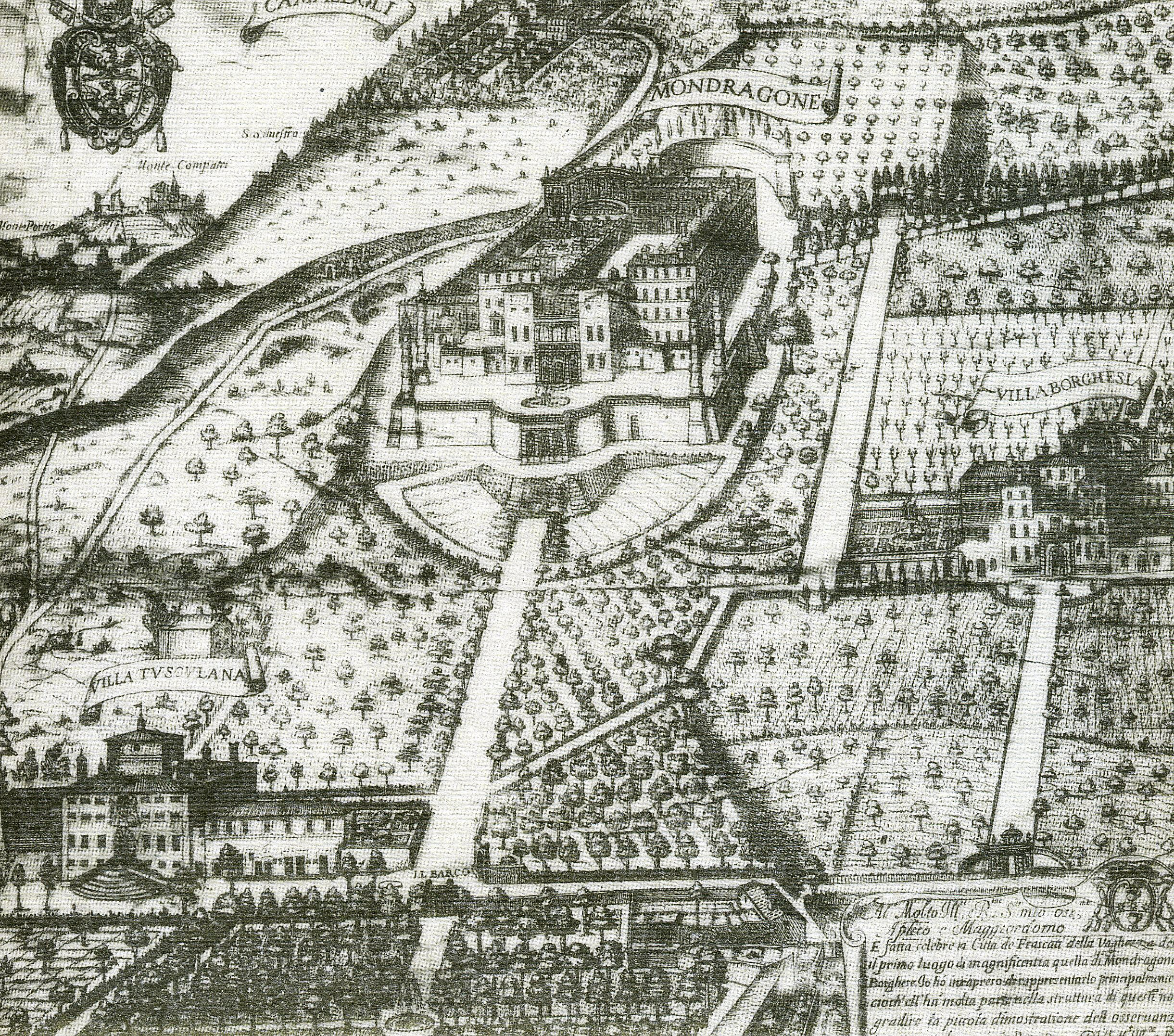 Foto della stampa di Matteo Greuter del 1620